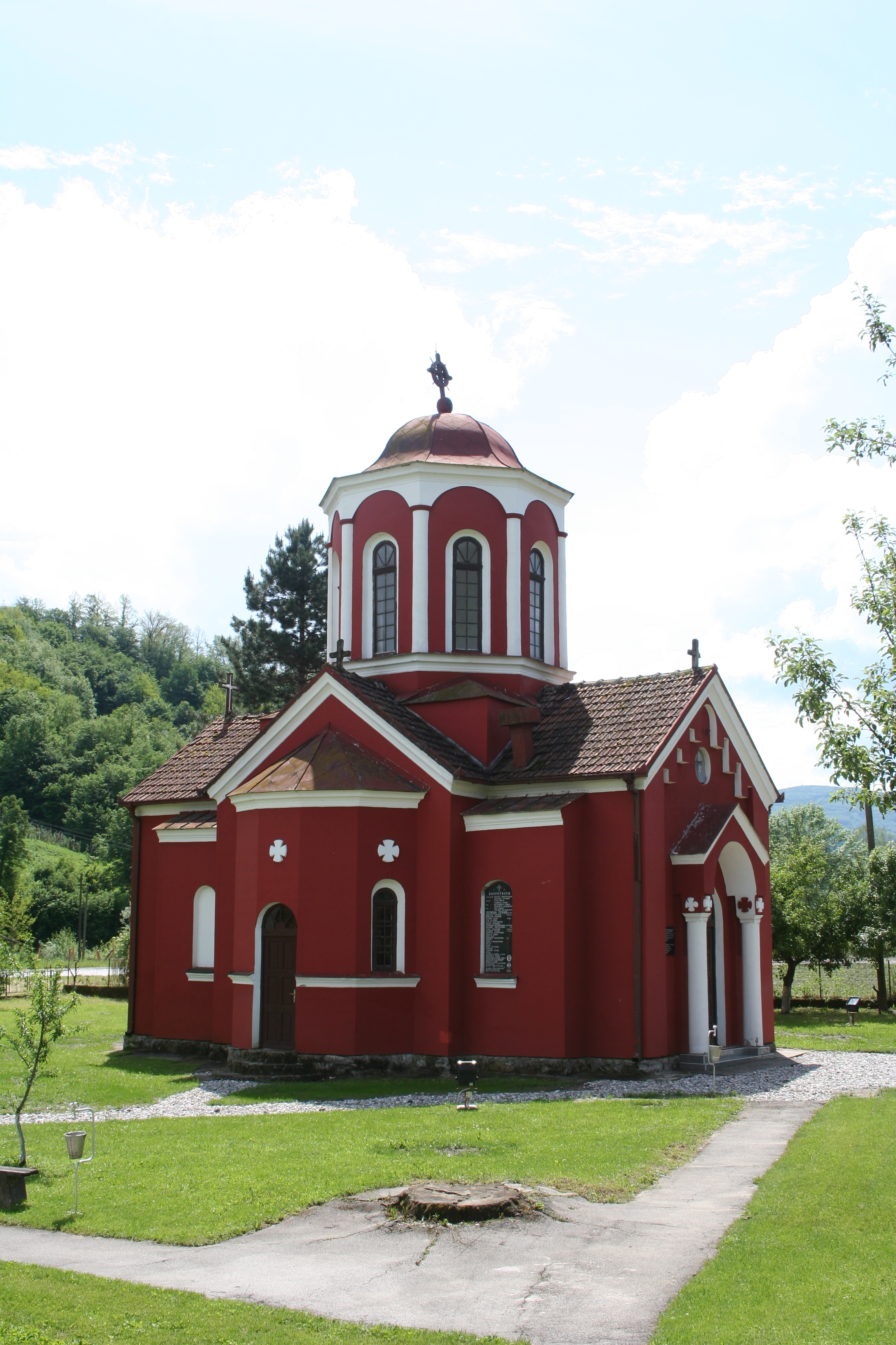 Crkva Sv. apostola Petra i Pavla u Dubu